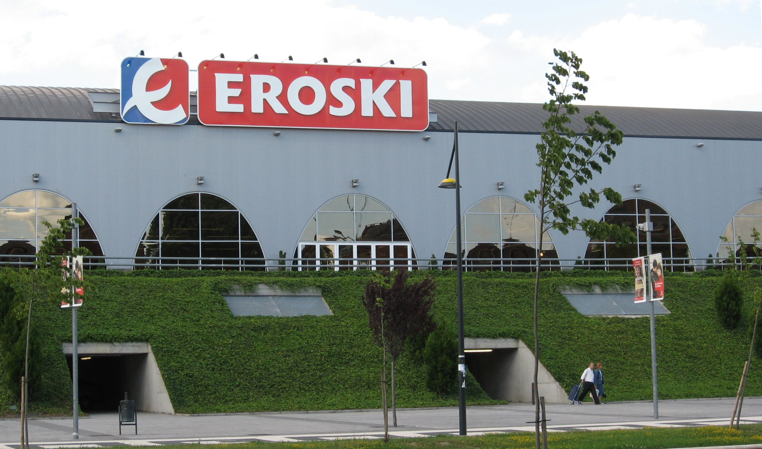 Centro Comercial Eroski en Vitoria